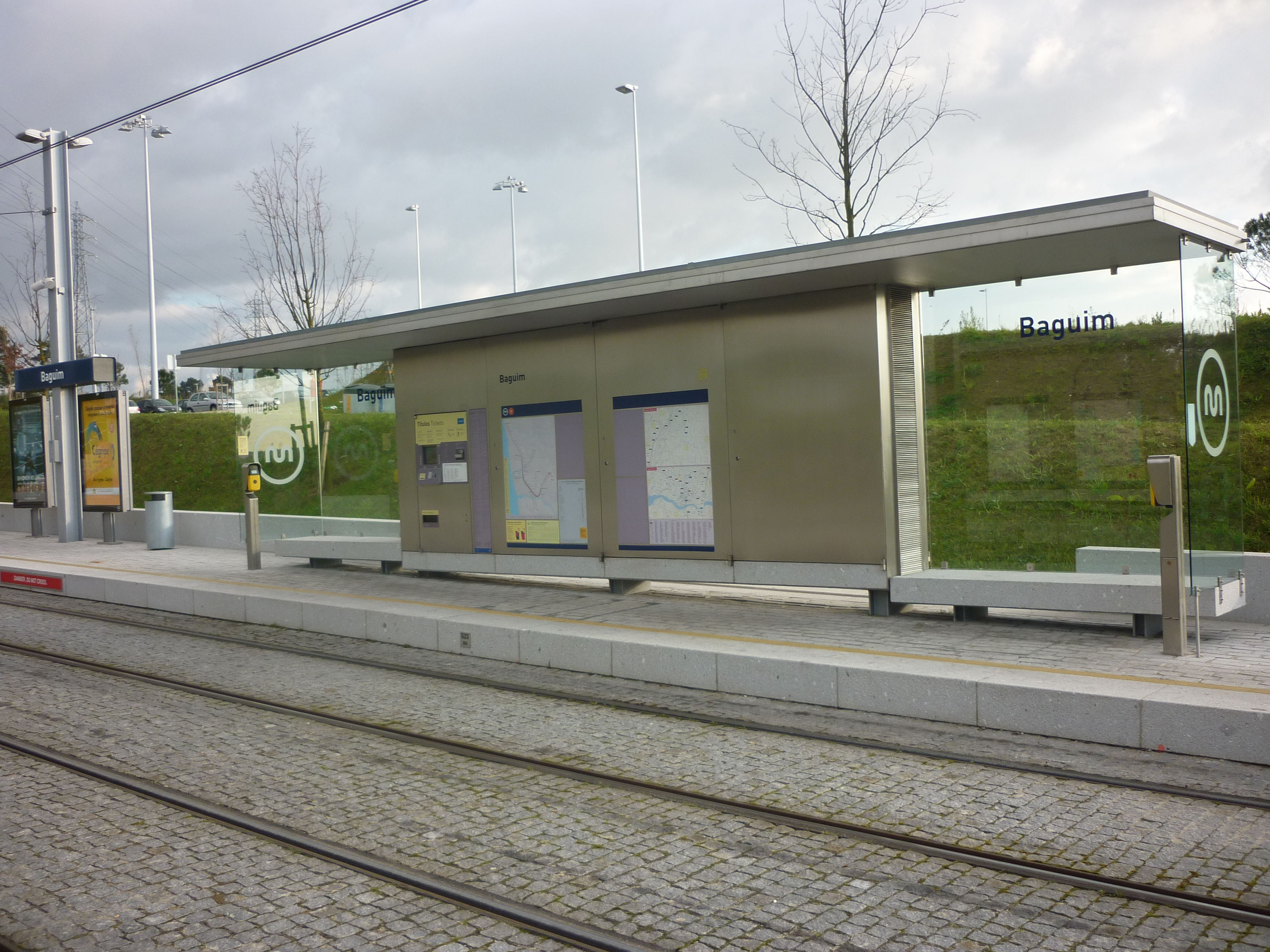 Estação Baguim. A maioria das estações de superfície do Metro do Porto possuem este aspeto.